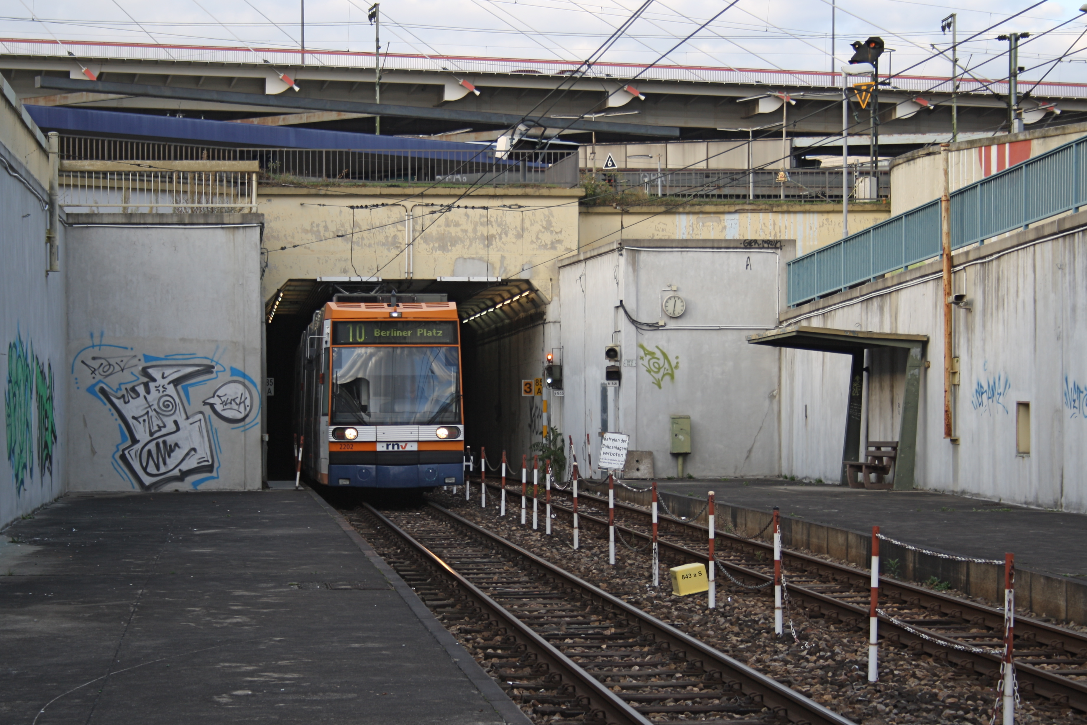 Straßenbahnhaltestelle Ludwigshafen Hauptbahnhof Ostausgang